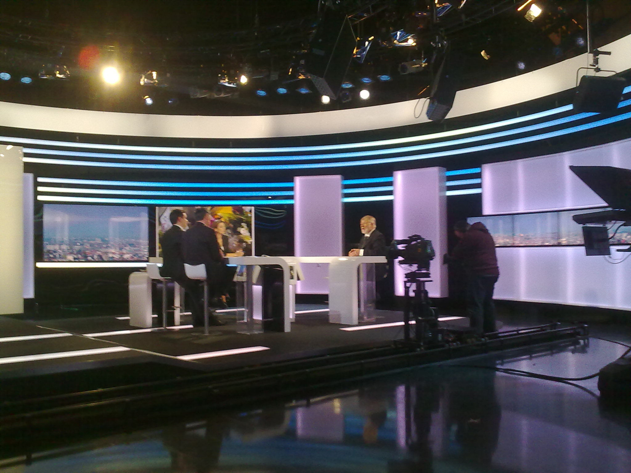 Intérieur d'un Studio de la RTBF au Bld Reyers à Bruxelles, mars 2012. Vue de caméra pilotée à distance, caméra portée et mobile.